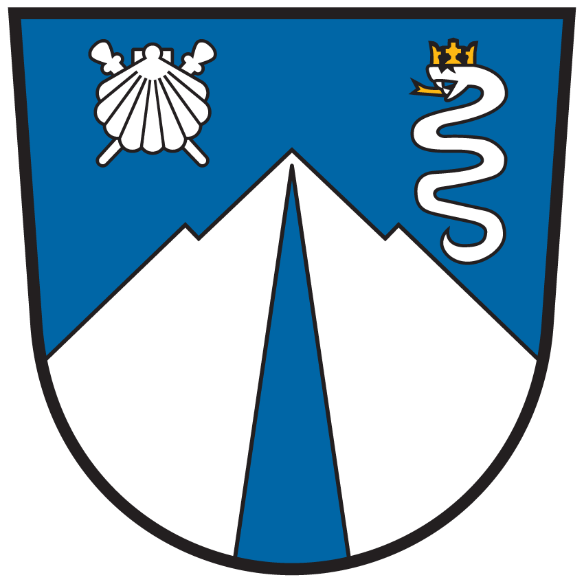 Wappen von Gallizien